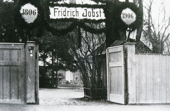 Firma von (Heinrich) Friedrich Jobst (* 2. Januar 1786 in Stuttgart; † 13. September 1859 ebenda).